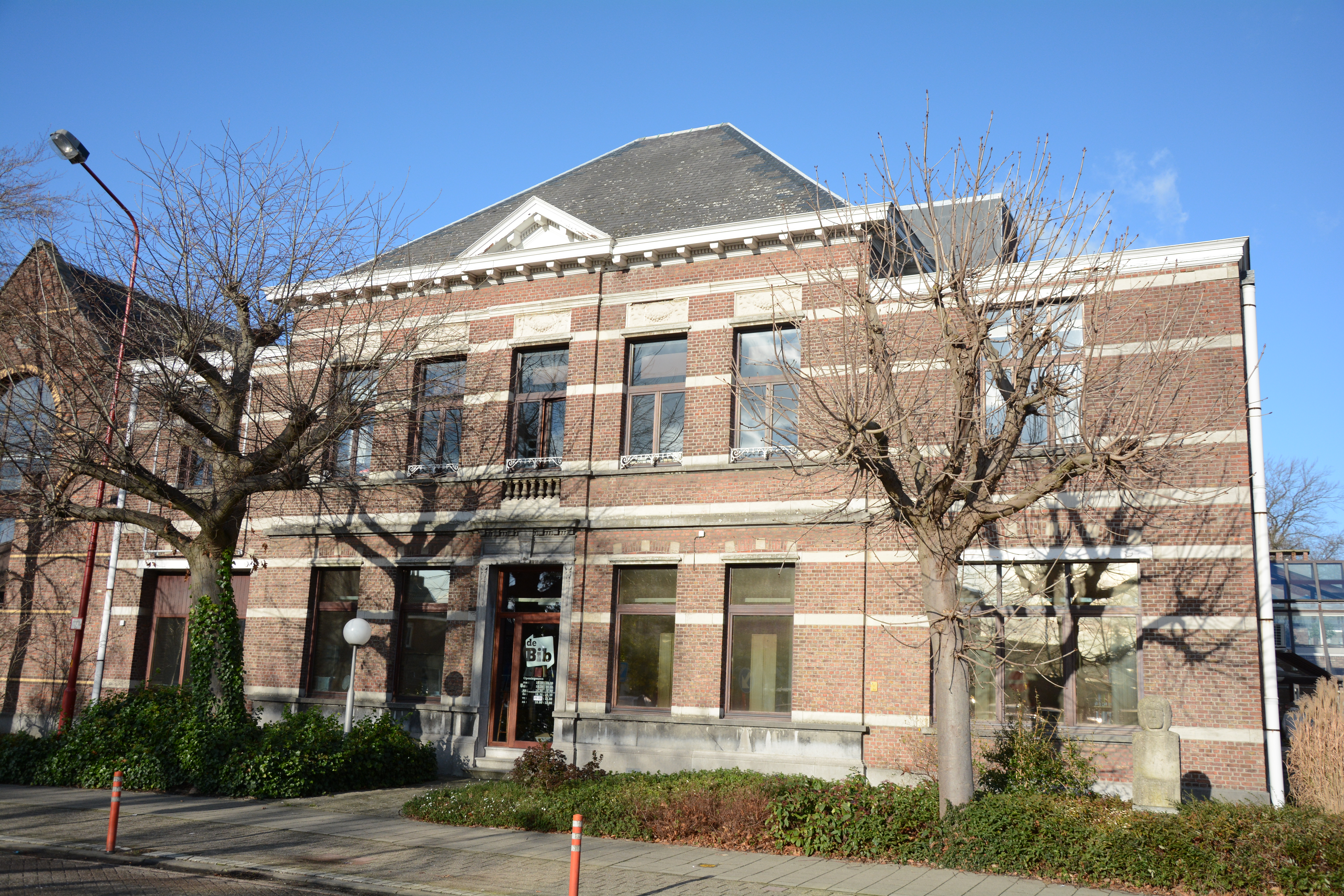 Voormalige "Brouwerij Vloeberghs-Van Hoof", thans Ontmoetingscentrum De Witte Merel, Liersesteenweg 27, Lint